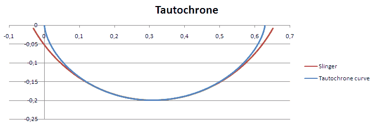 tautochrone pendulum & semi circular pendulum